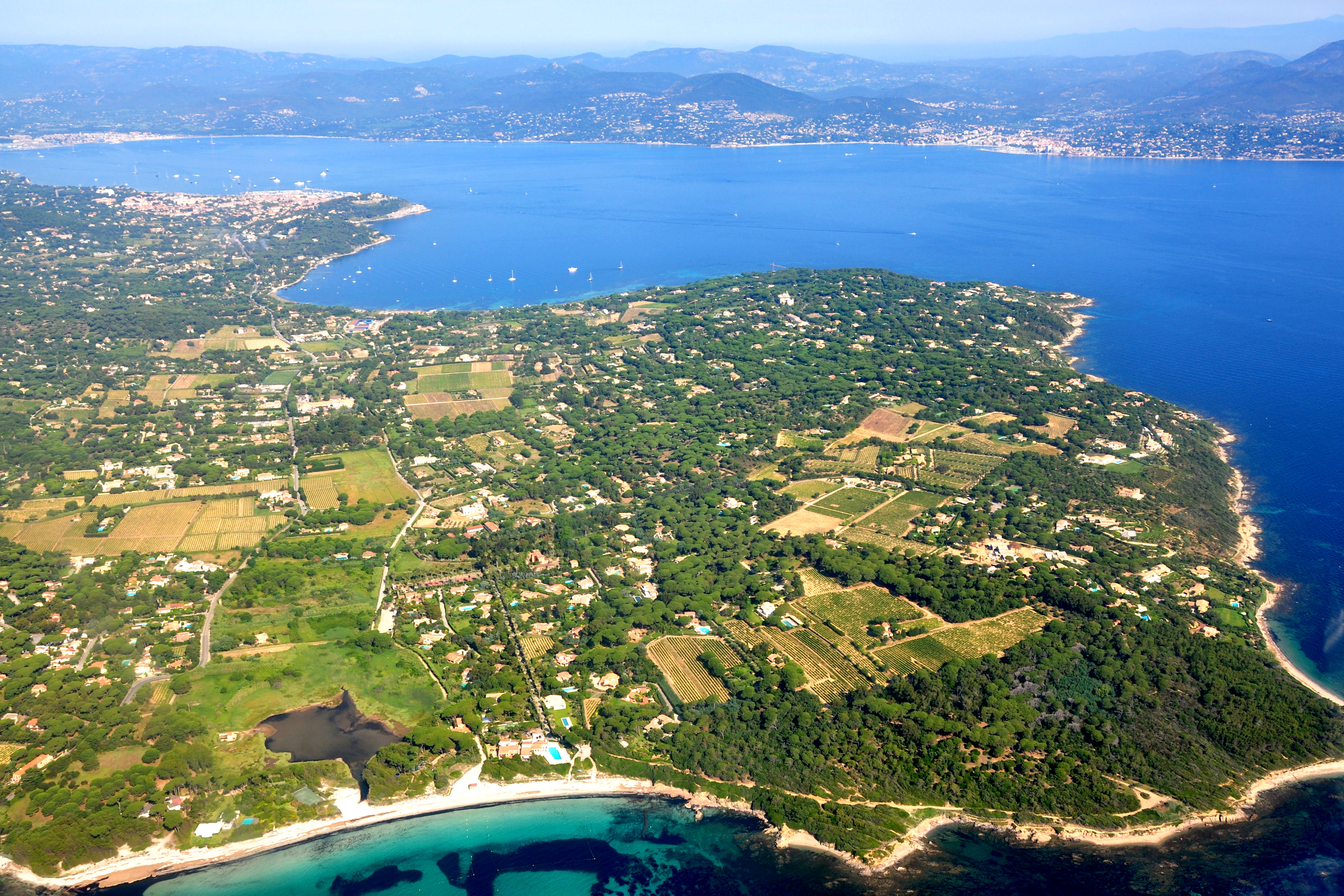 Vue aérienne de la presqu'île de Saint-Tropez